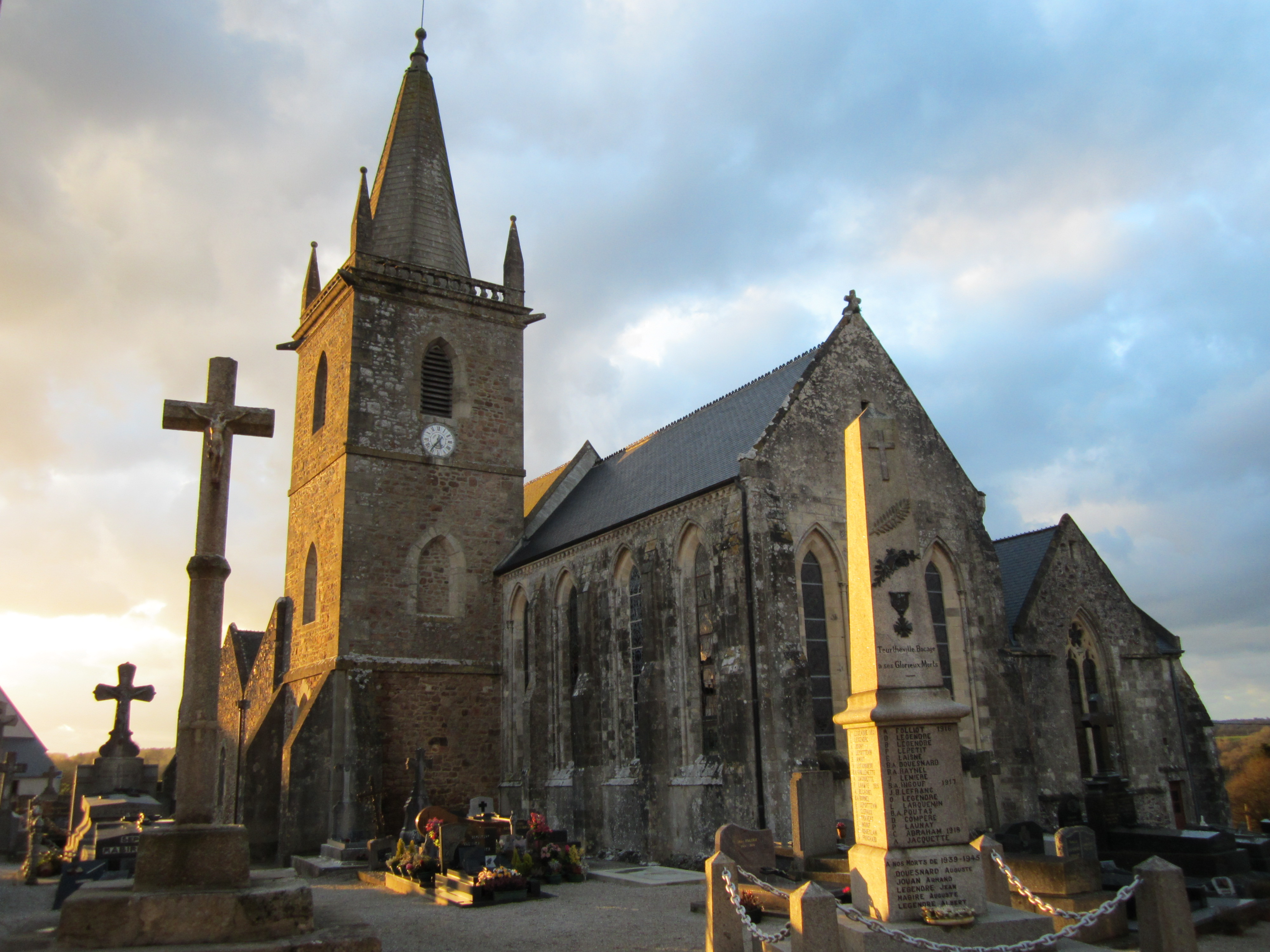 Église Sainte-Trinité de Teurthéville-Bocage